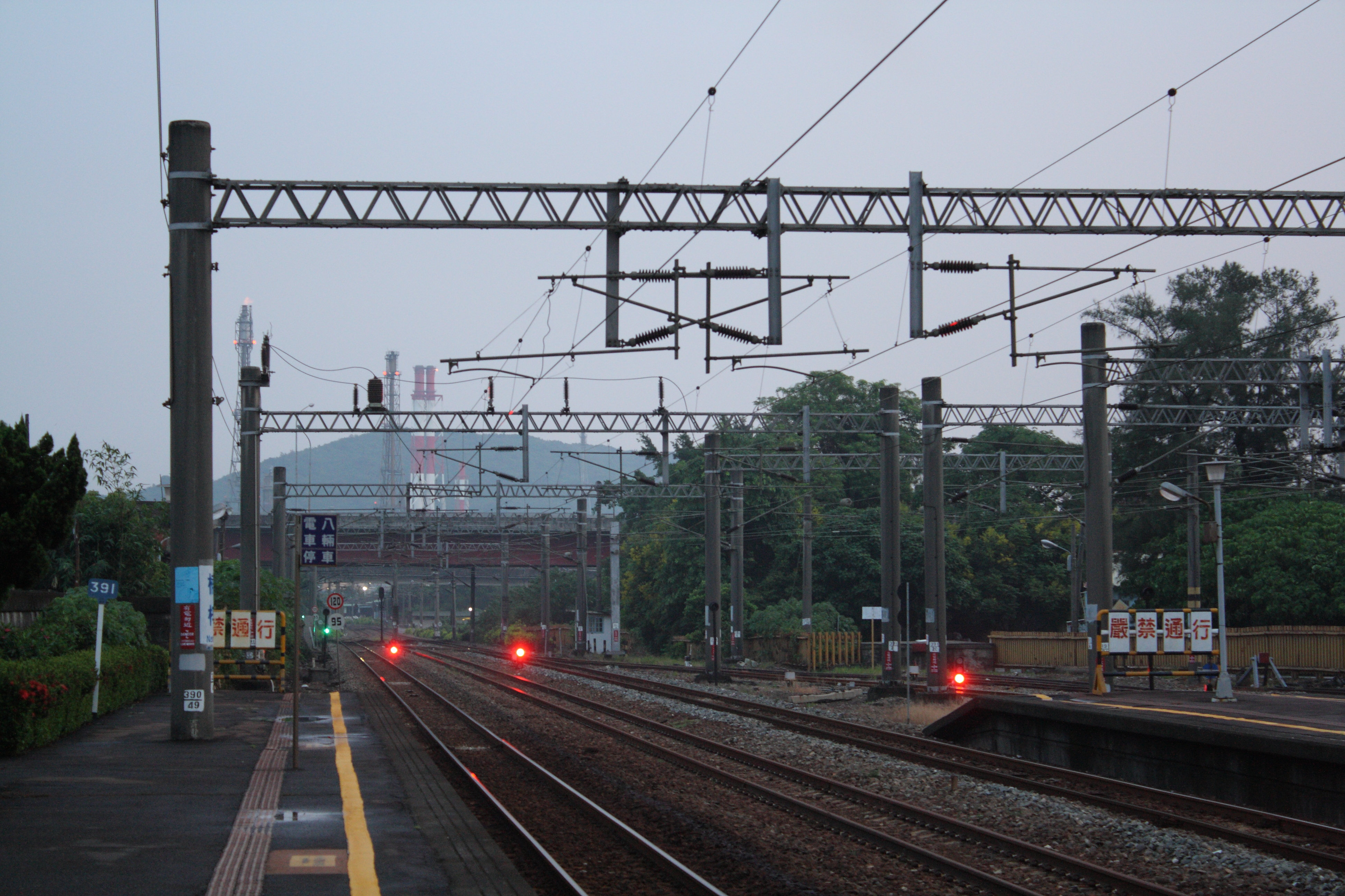 臺灣鐵路管理局楠梓車站月台尾端。